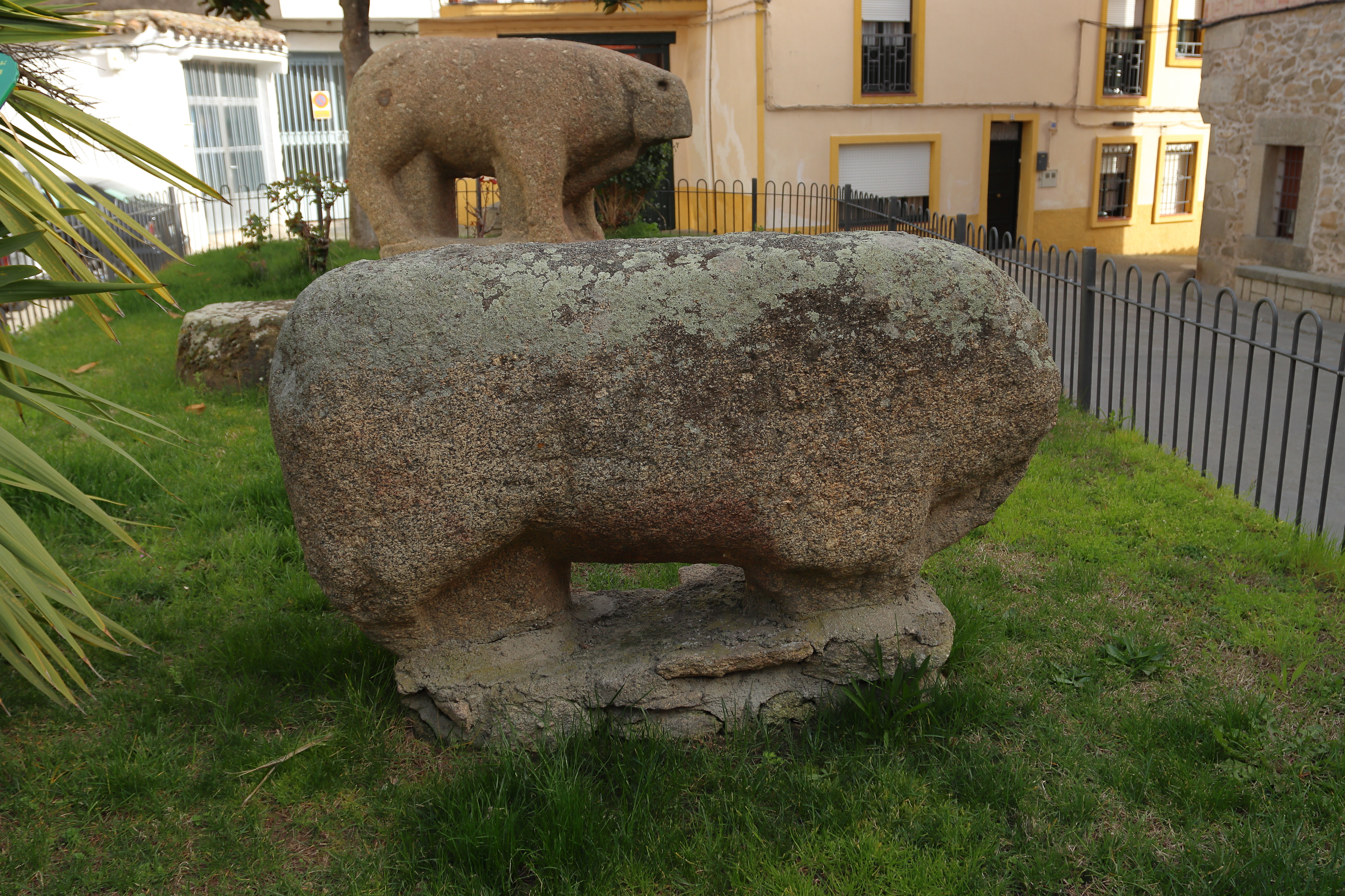 Verraco vetón, Castillo de Bayuela, 02b